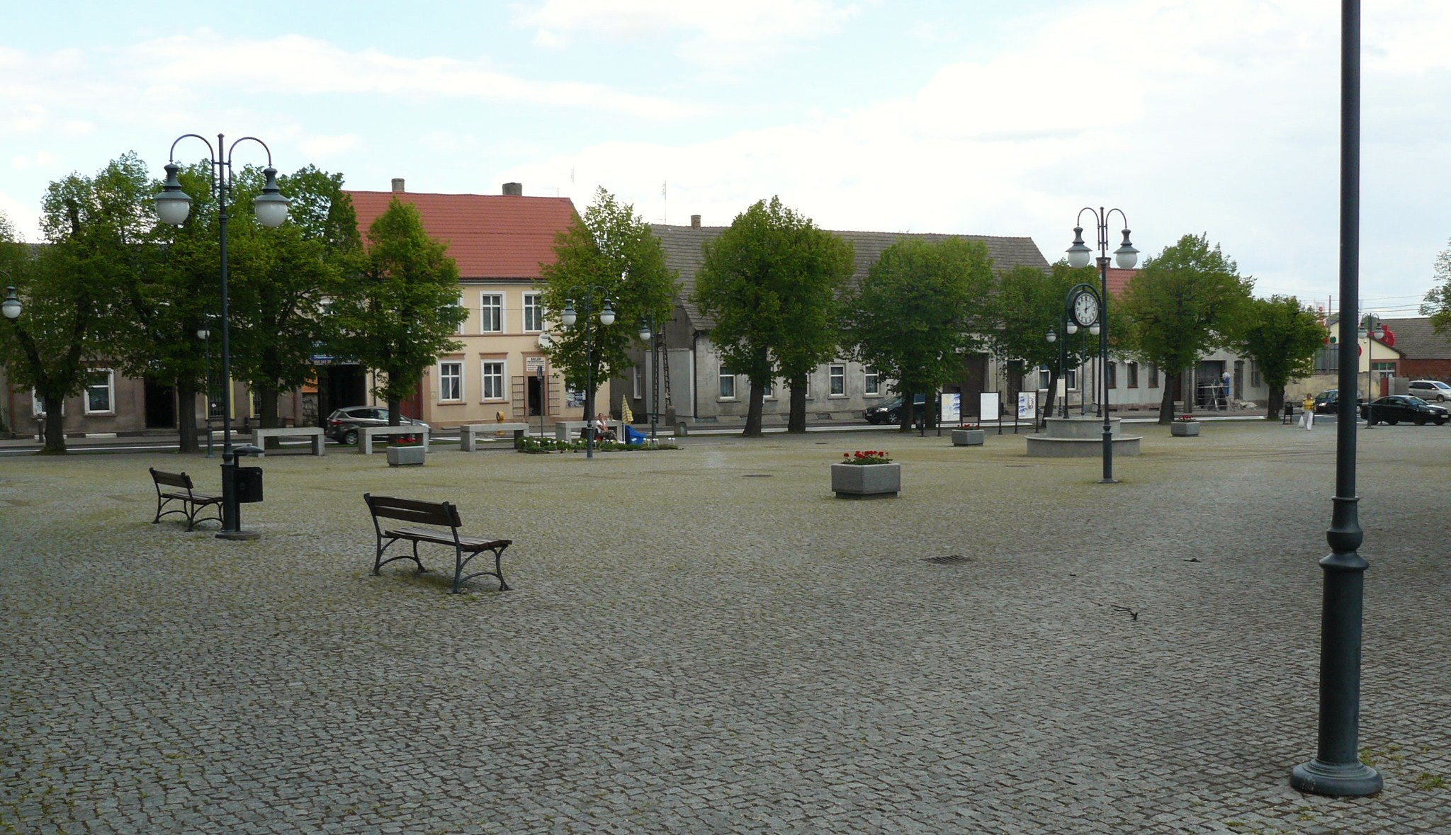 Rynek w Suchaniu.